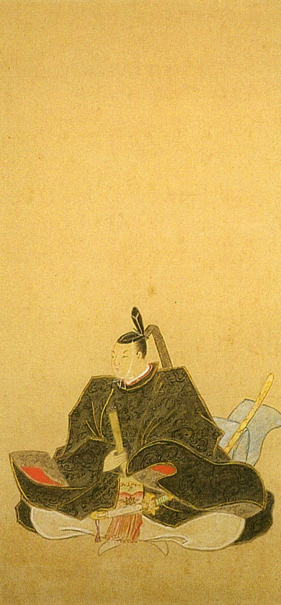 丹羽高庸の肖像画(市指定文化財)。